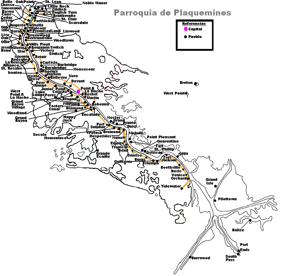 Mapa con las localidades de Plaquemines, una parroquia del Estado de Louisiana.